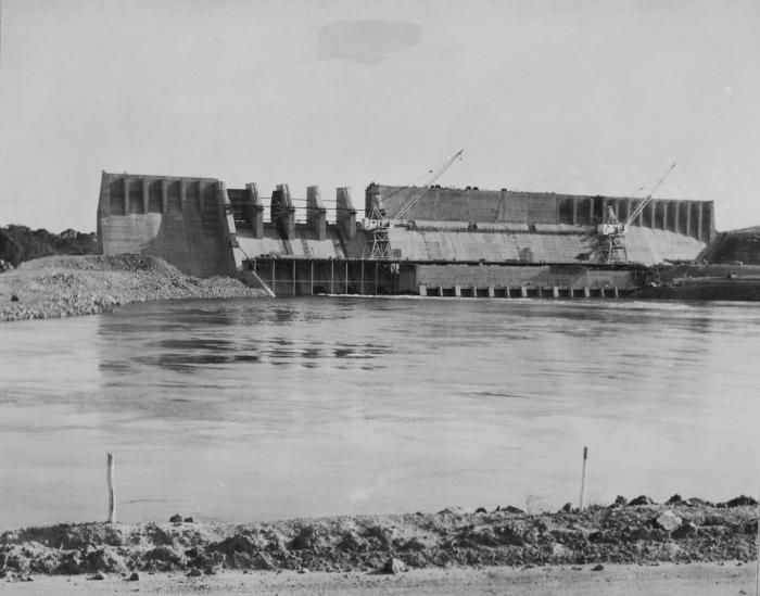 foto. Stuwdam in aanbouw voor de waterkrachtcentrale te Afobaka